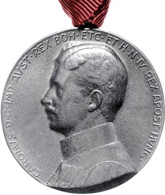 Zivil-Verdienstmedaille (Österreich-Ungarn) in Silber, Sammleranfertigung der am 30. April 1918 durch Kaiser Karl I. gestifteten Auszeichnung. Vorderseite.